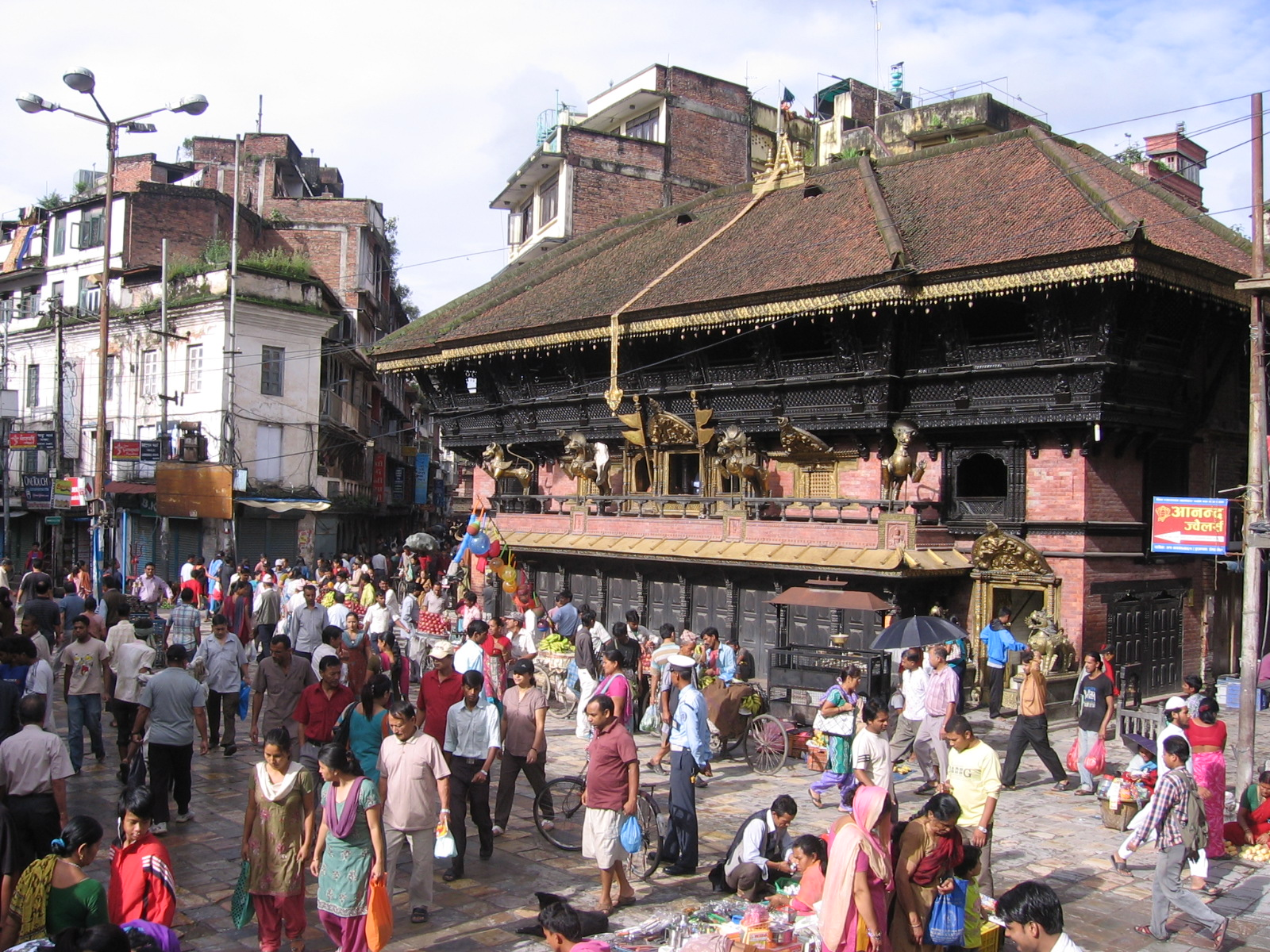 Wangah Square (Indra Chok) in Kathmandu.